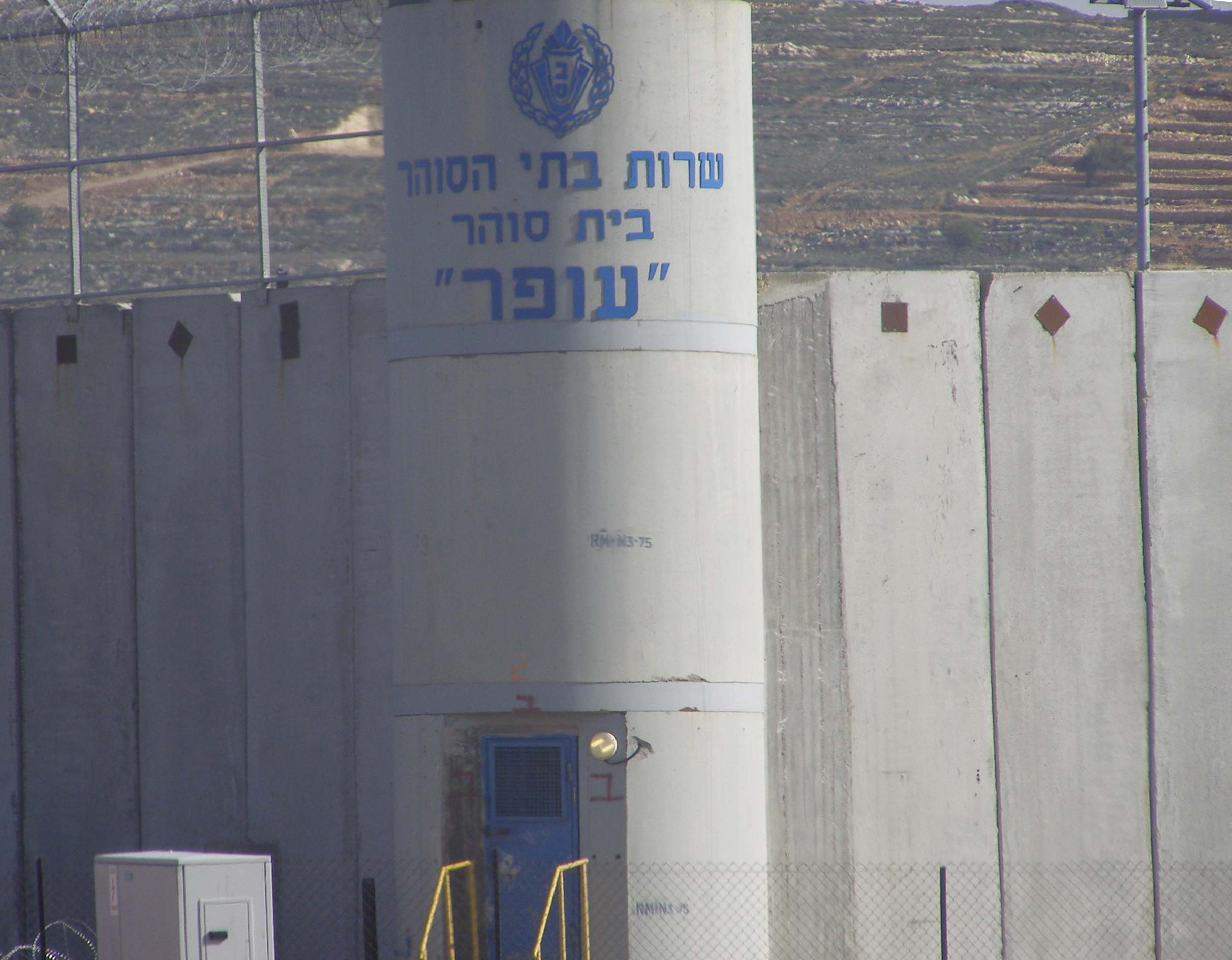 בית סוהר עופר